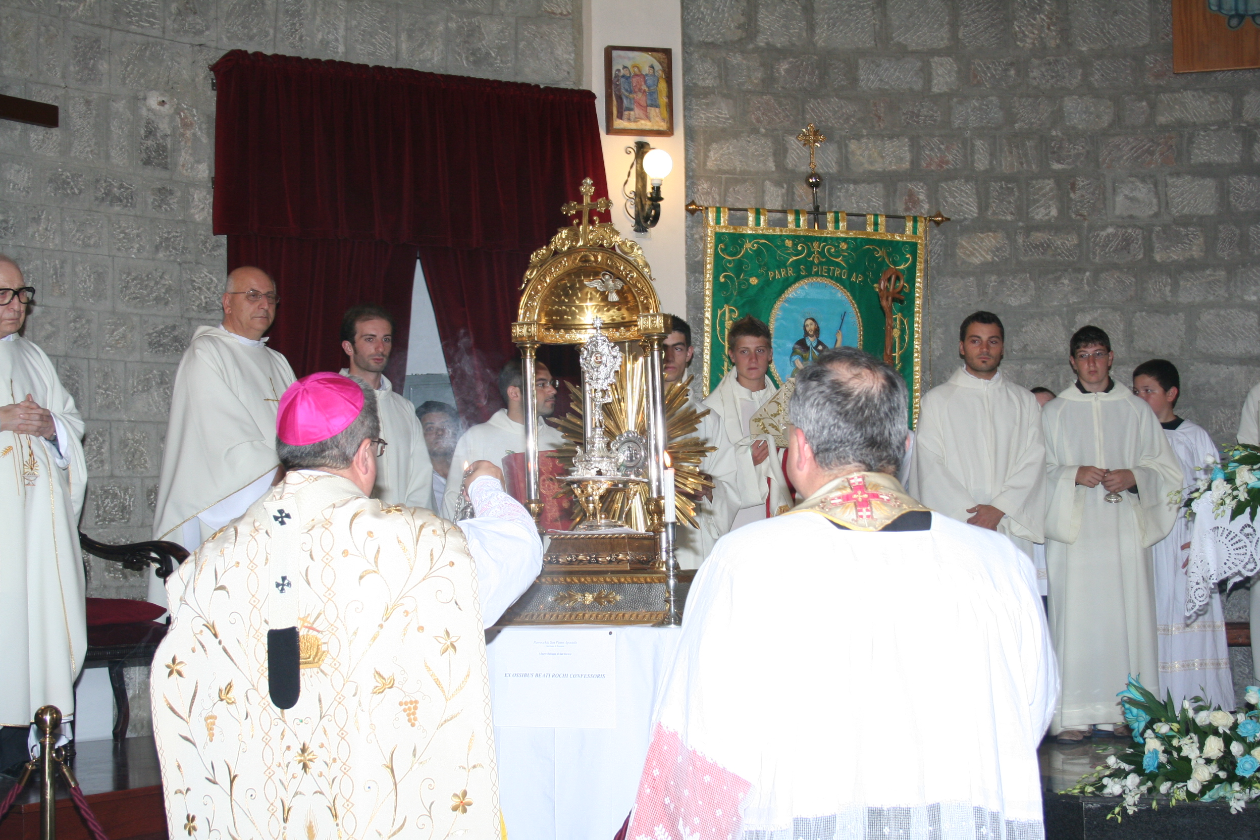 Offerta dell'incenso alla reliquia di San Rocco a Satriano di Lucania